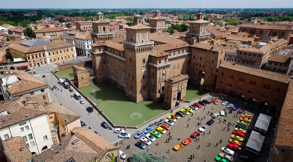 festival